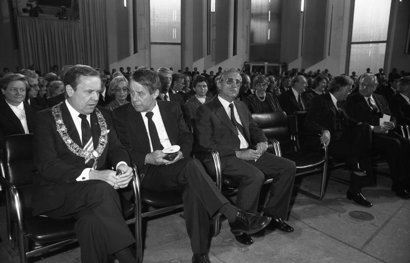 16.10.1983 Verleihung des Friedenspreises des Deutschen Buchhandels 1983 an Manes Sperber (nicht anwesend) in der Frankfurter Paulskirche.